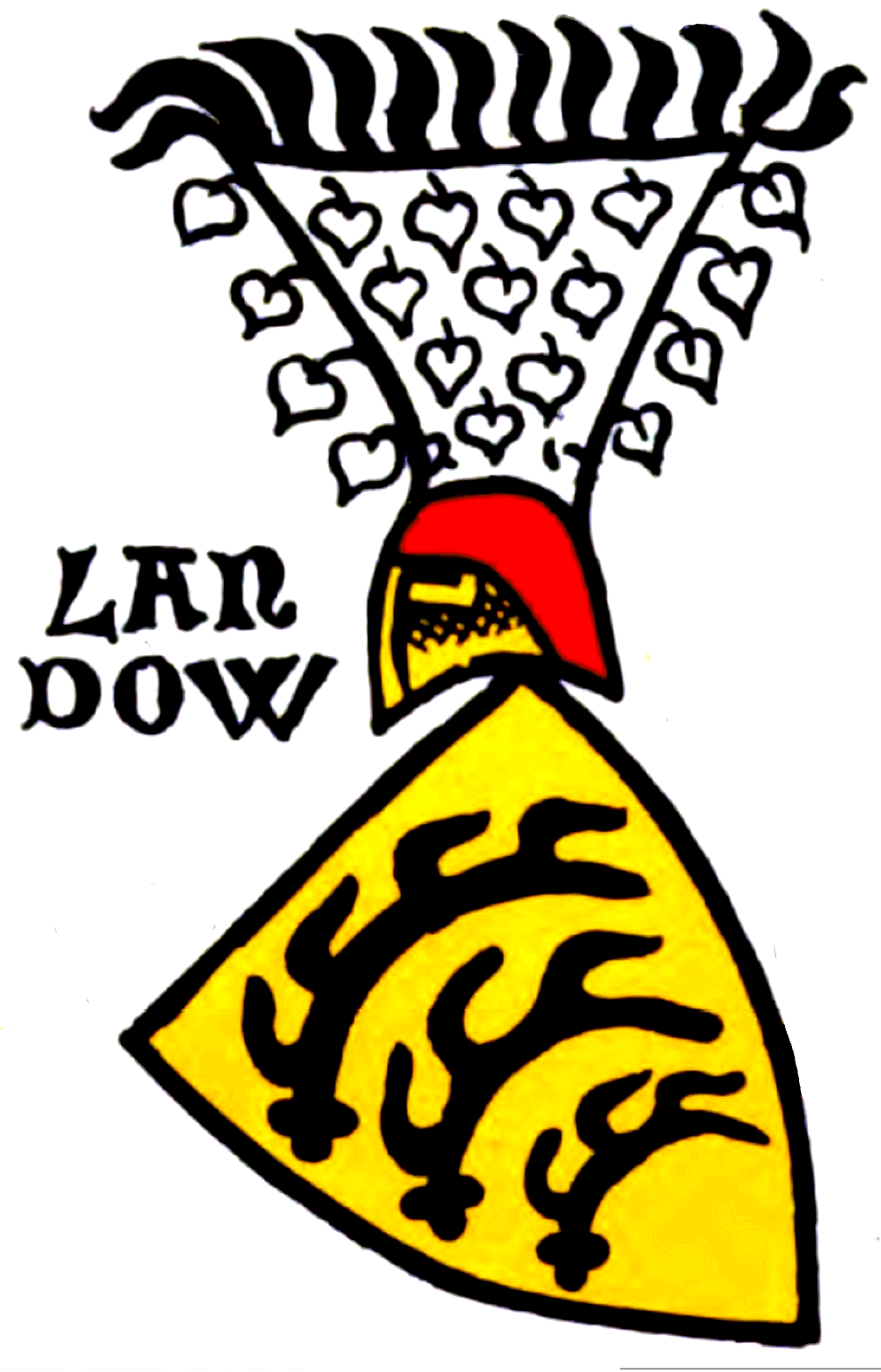 Wappen der "Landow"